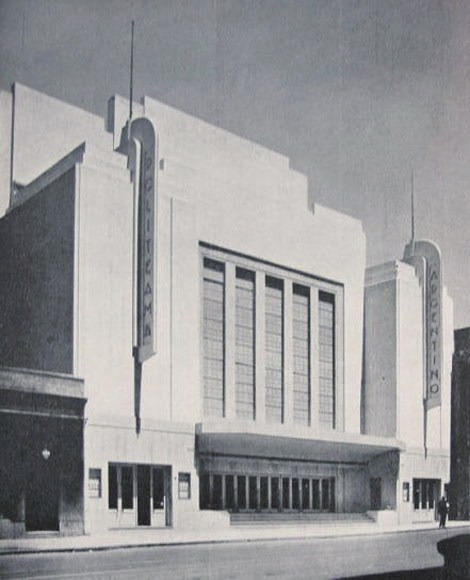 Vista del Teatro Politeama Argentino, en Avenida Corrientes 1490 (Buenos Aires). Demolido en 1958.